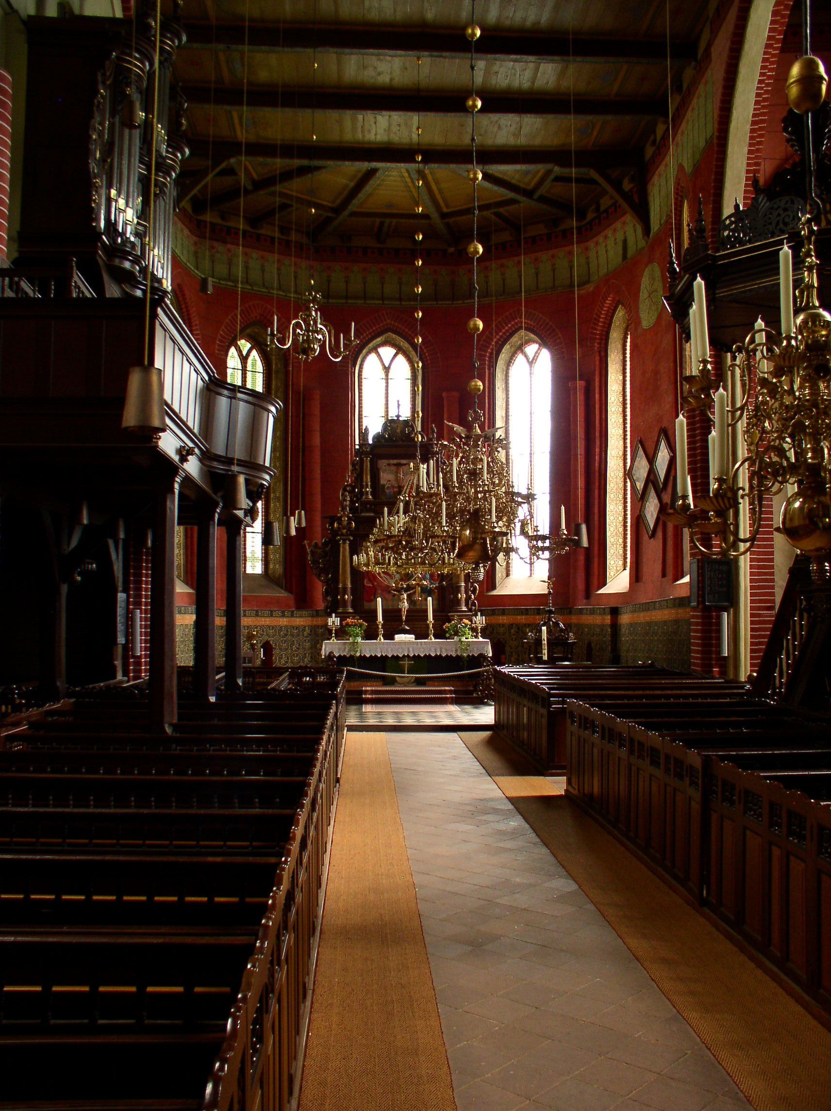 Innenansicht Kirche Reepsholt